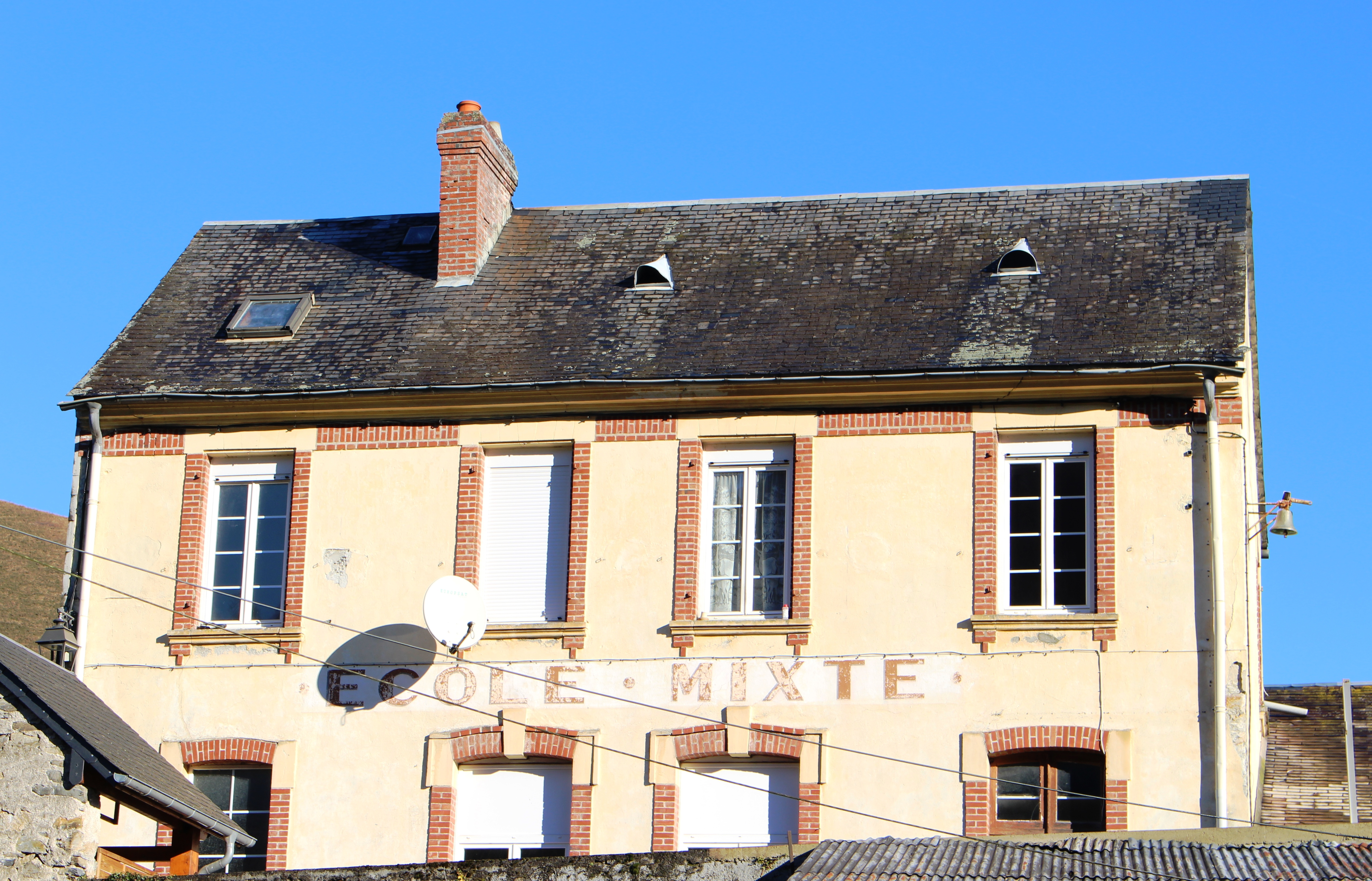 École de Cheust (Hautes-Pyrénées)